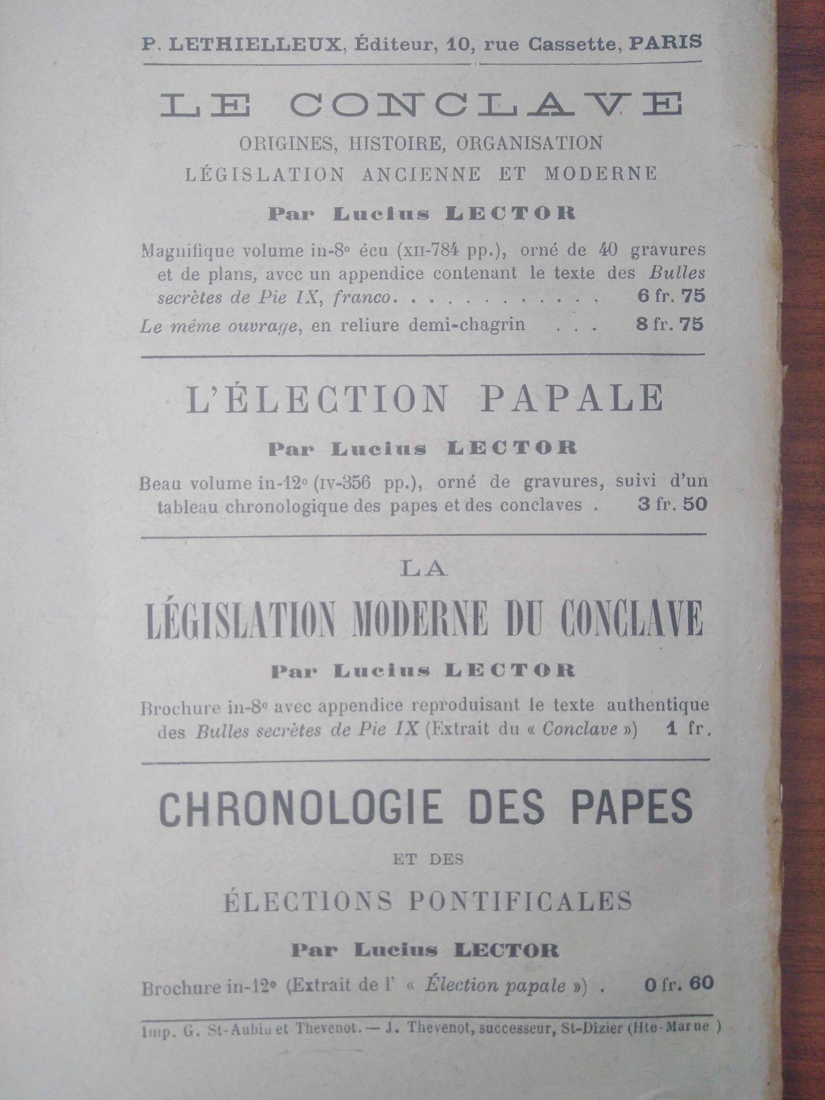 Joseph Guthlin - Publications sous le nom de plume Lector Lucius